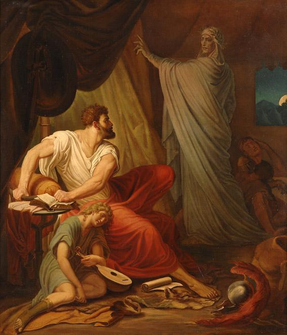 Possibly Heinrich VII. und Dante